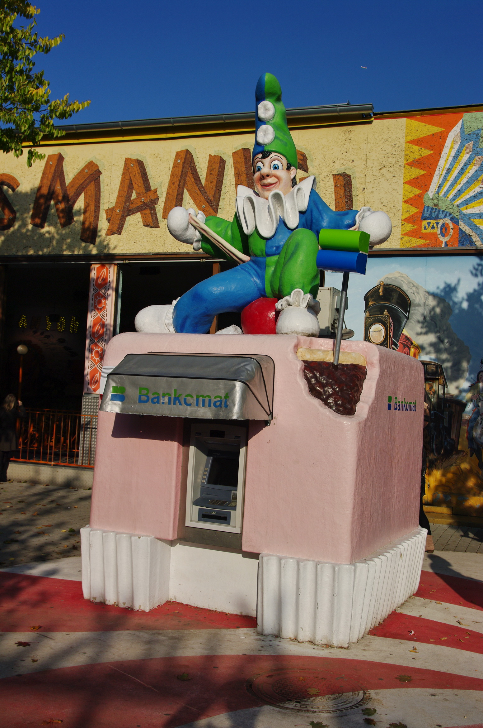 Bankautomat im Wiener Prater